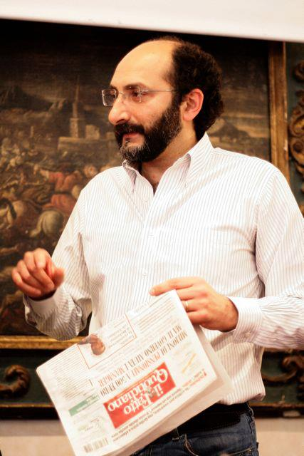 Marco Lillo al Festival Internazionale del Giornalismo